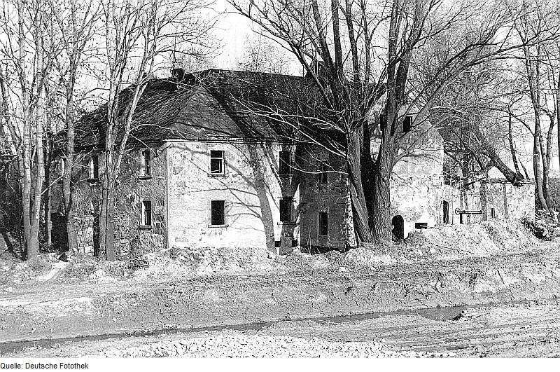 Original image description from the Deutsche Fotothek Ralbitz-Rosenthal-Naußlitz. Ehem. Jurasmühle, Ansicht, ruinös